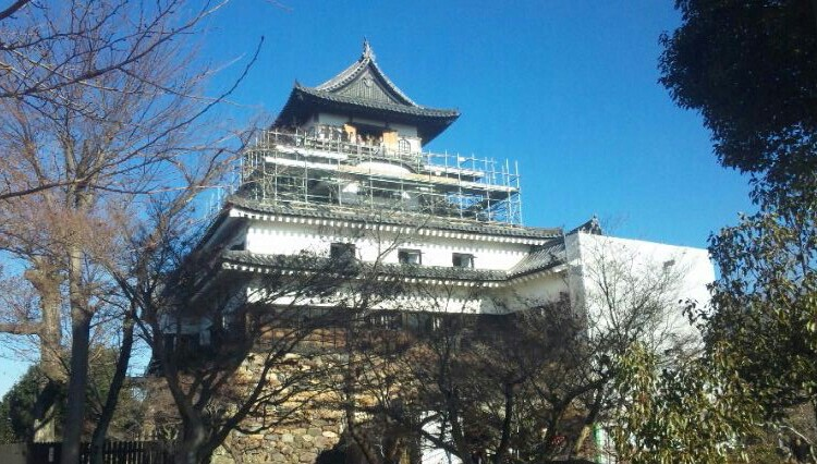 国宝犬山城